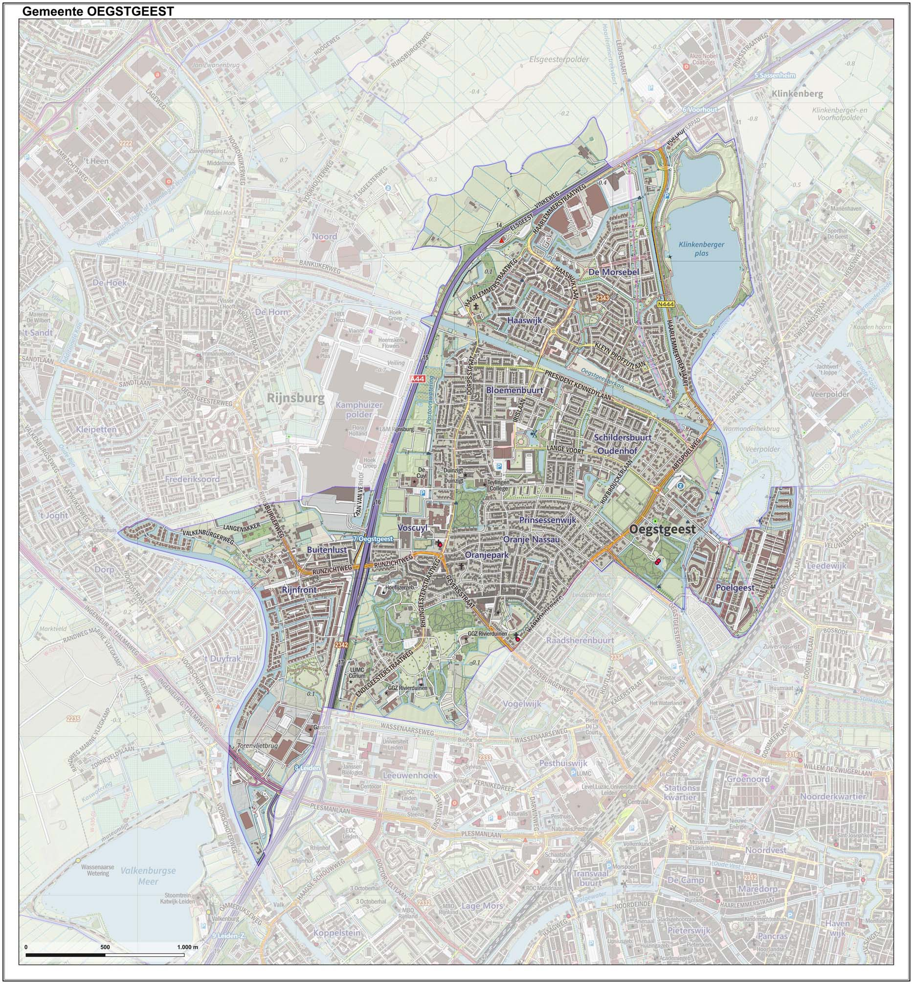 Topografische gemeentekaart. Resolutie: 400 pixels/km. Kaartbeeld samengesteld uit de open geodata van de Top10NL en Top25namen (Kadaster), Creative Commons-BY licentie. Gebouwvlakken uit open geodata BAG extract. Wegen uit de OpenStreetMap, OpenStreetMap community. Reliëfschaduw uit de Actuele Hoogtekaart AHN2. Samenstelling en kleurenschema: Jan-Willem van Aalst, met QGIS. Zie ook de Legenda.